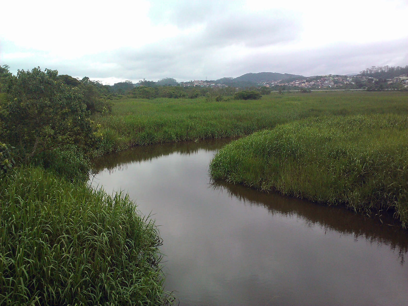 Rio do Cloro River in Rio Grande da Serra(Greater Sao Paulo Area), Brazil.